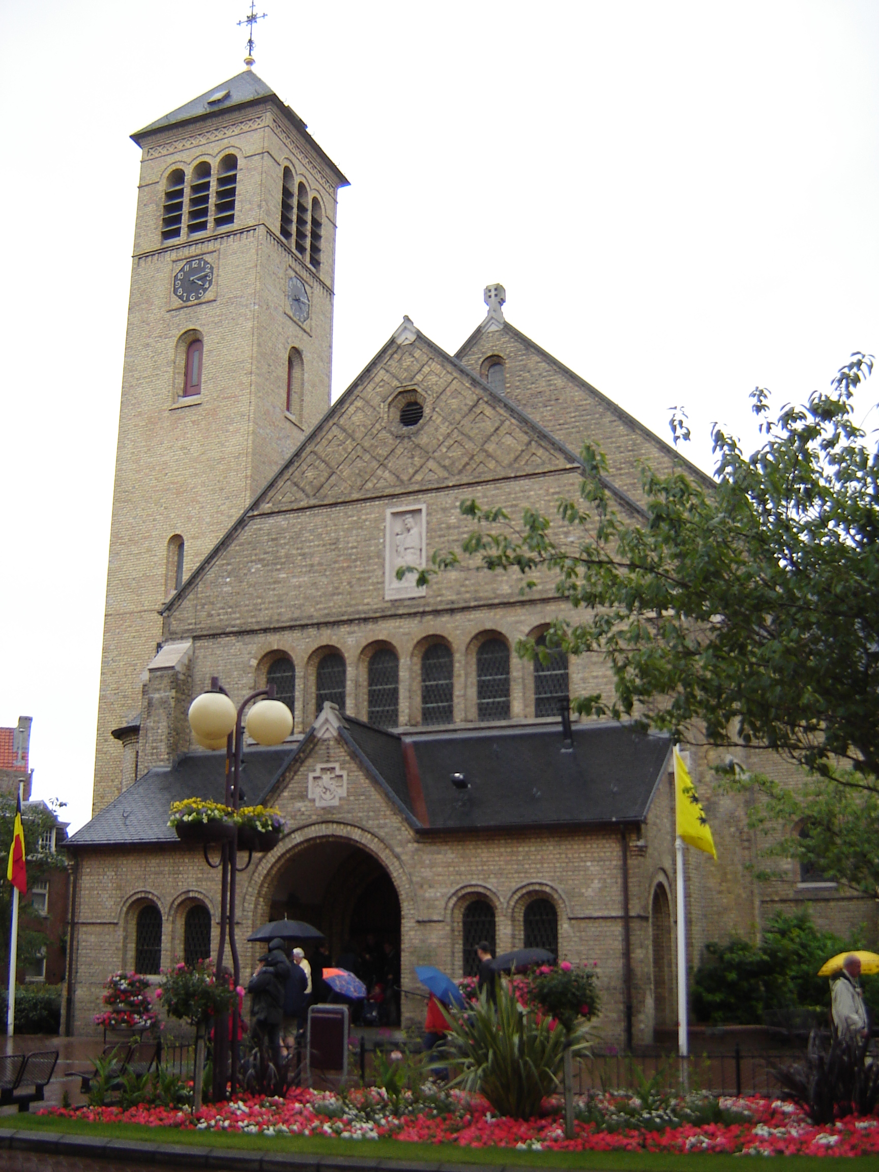 Onze-Lieve-Vrouwekerk in De Panne. Church of Our Lady in De Panne, West Flanders, Belgium